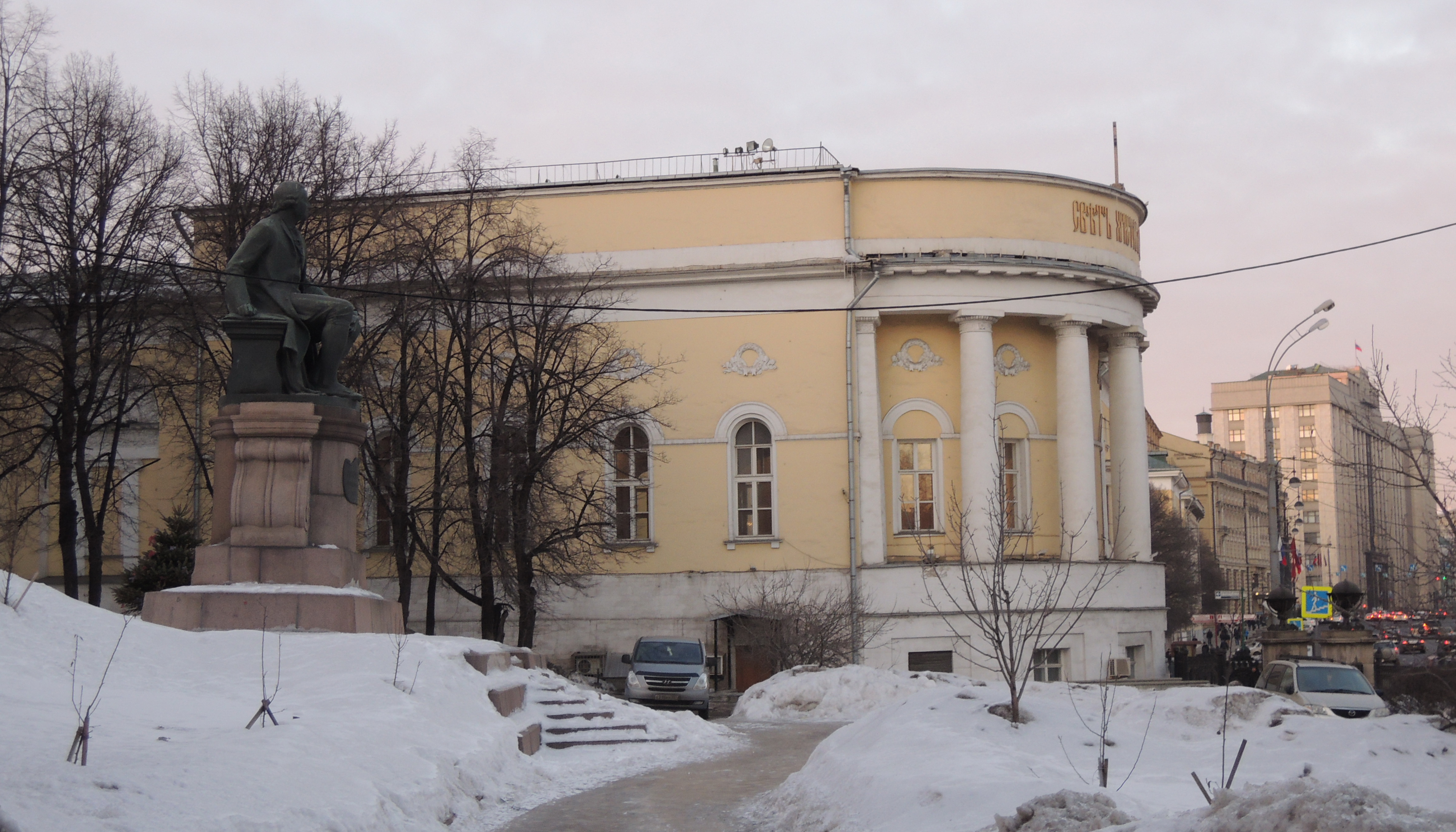 Татьянинская церковь МГУ на Моховой улице